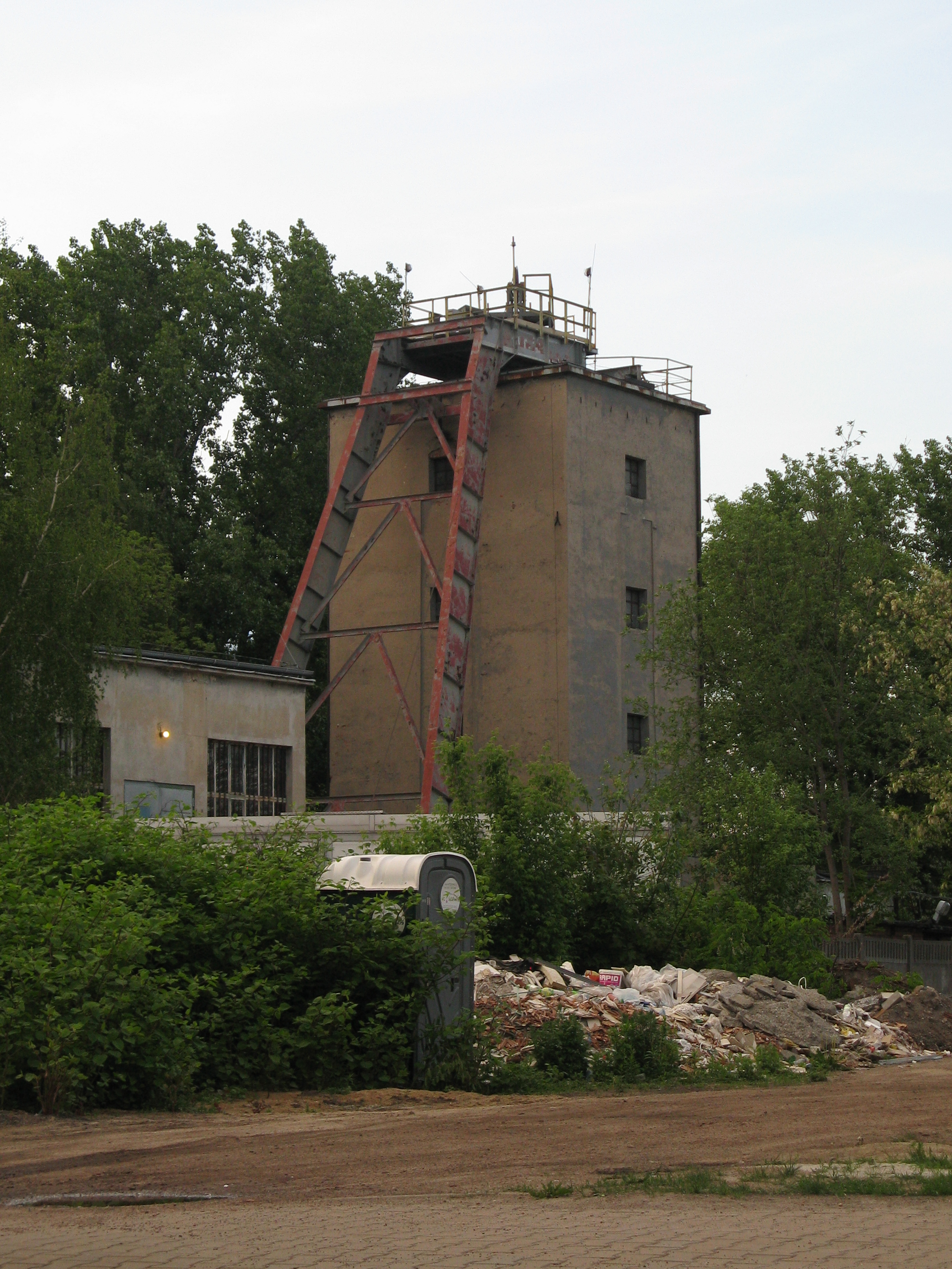 Wieża wyciągowa szybu Zygmunt August II w Chorzowie-Maciejkowicach; dawny szyb wentylacyjny kopalni węgla kamiennego Barbara-Chorzów.